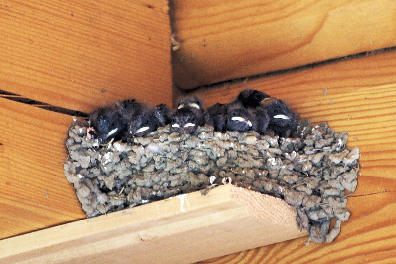 Suitsupääsukese pojad pesas. Jõgevamaa